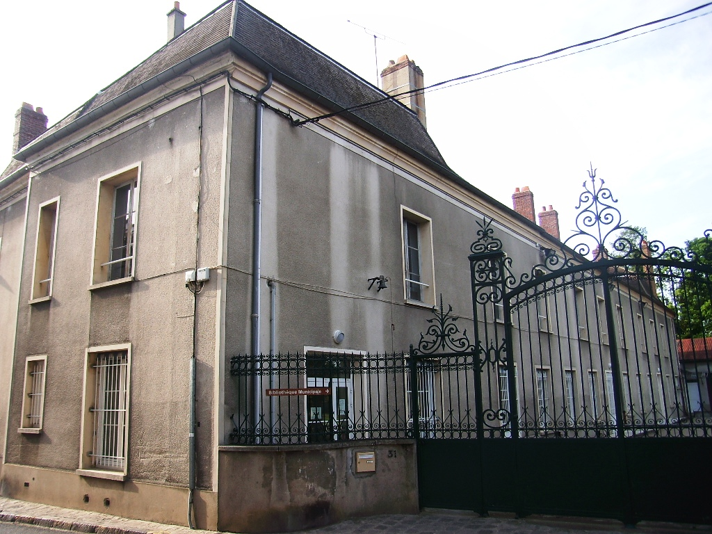 Anciennes écuries du château d'Arpajon (91) aujourd'hui bibliothèque municipale